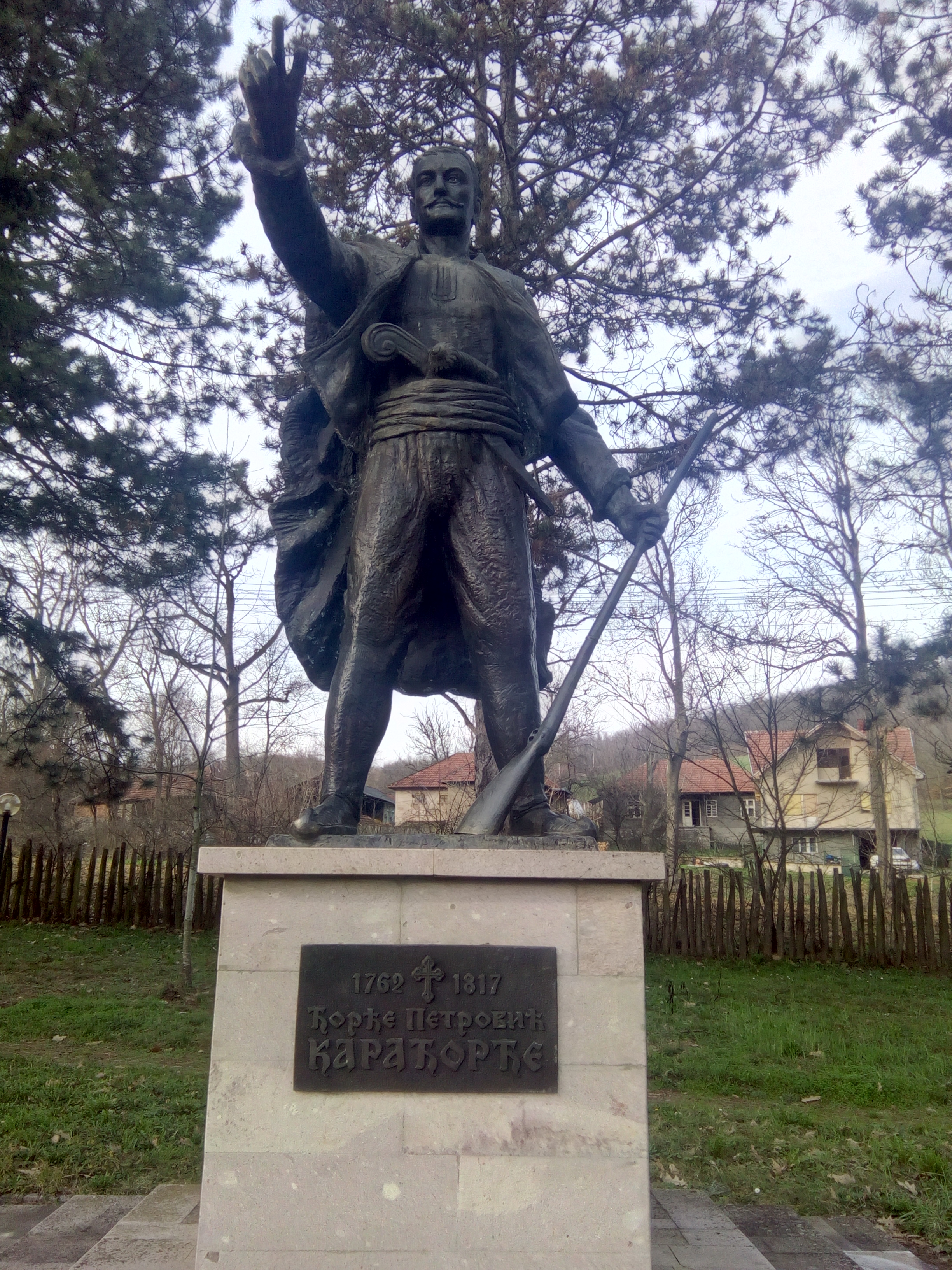 Srpski (latinica): Spomenik Karađorđu u Viševcu